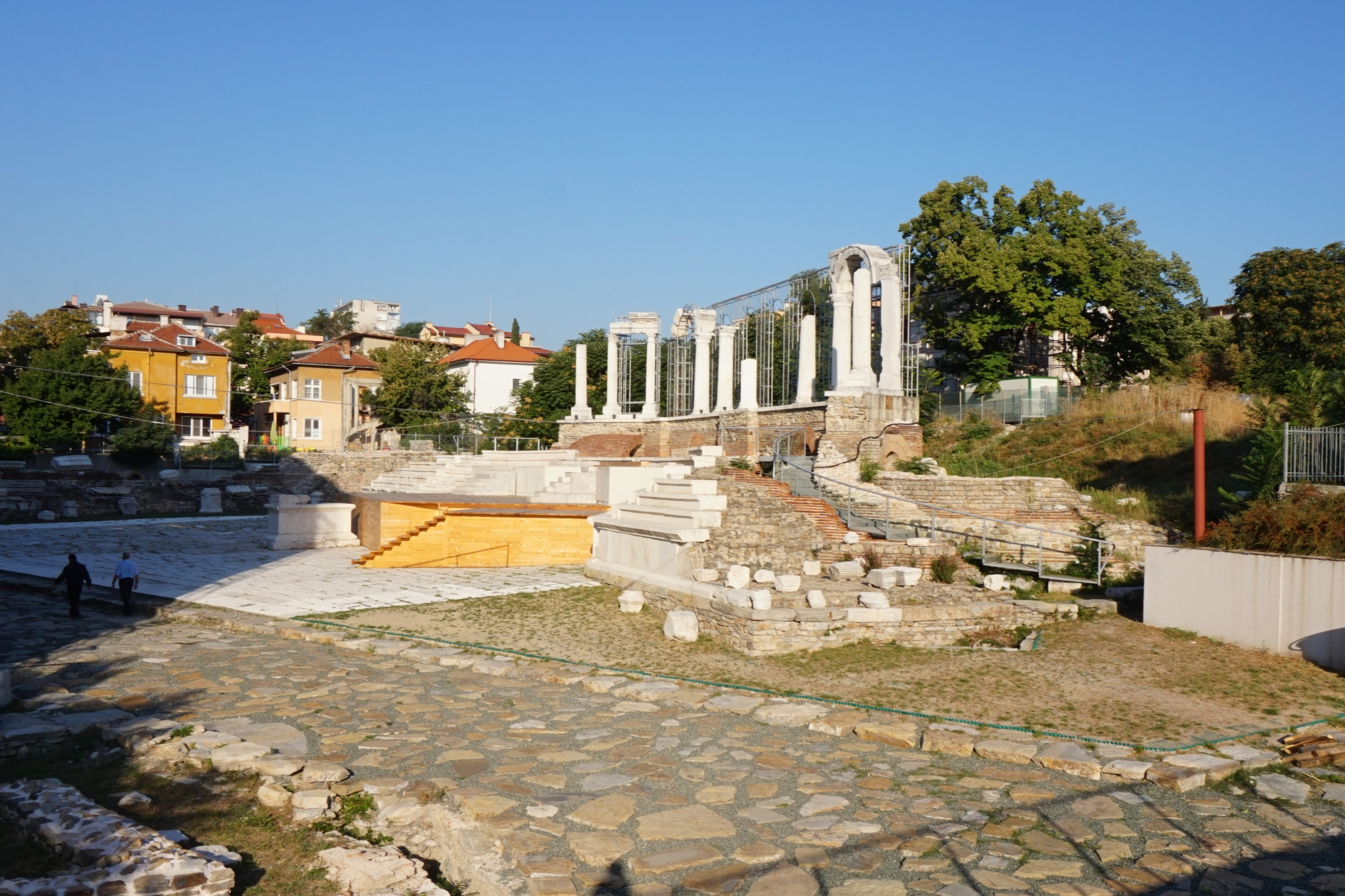 Форумът при западната порта на Августа Траяна е една от забележителностите на Стара Загора.